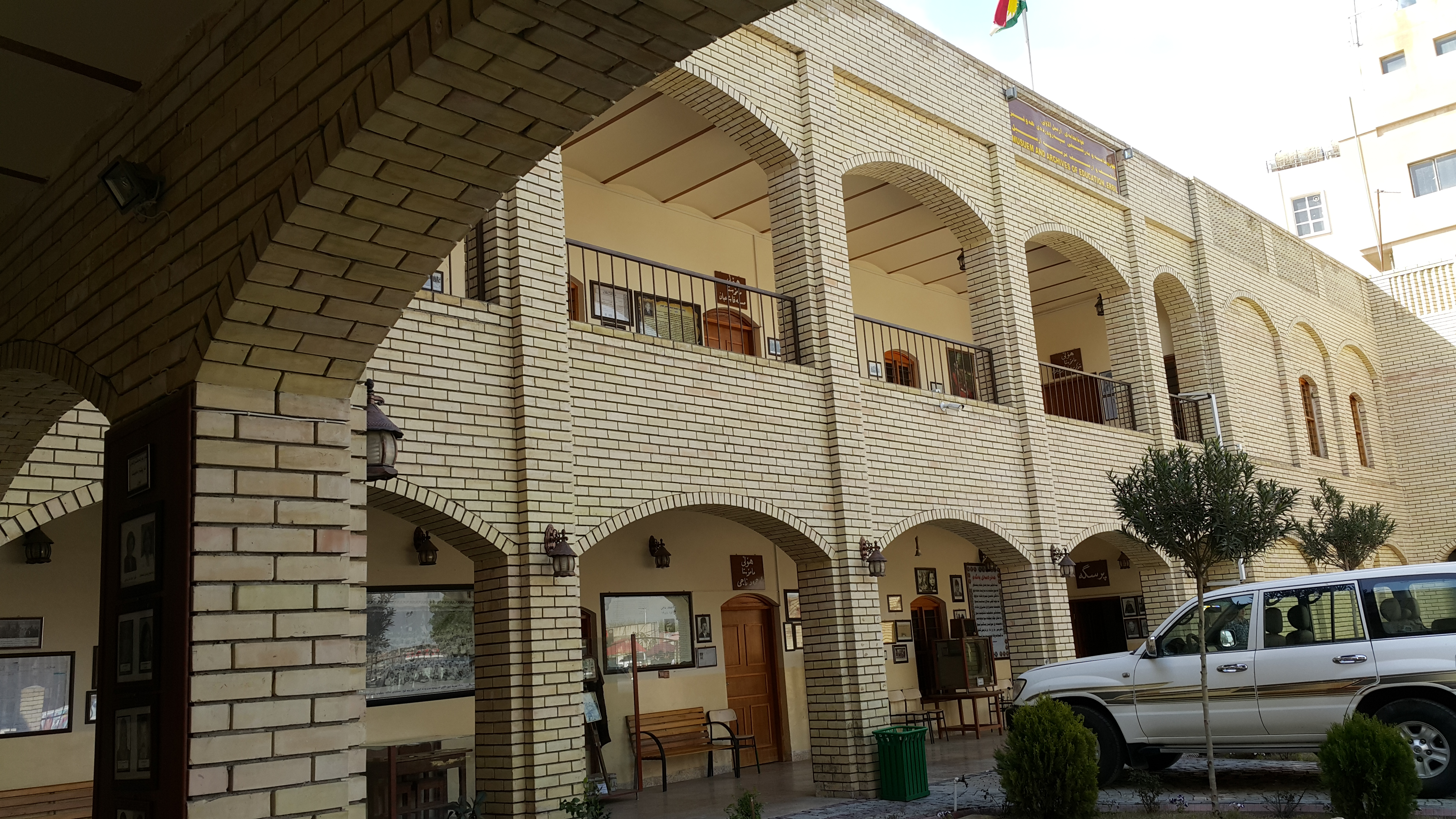 کوردی: یەکەمین قوتابخانە لەشاری هەولێر لە ئێستادا مۆزەخانەی پەروەردەییە